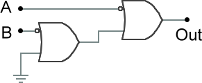 使用蘊含閘組合成的與非閘